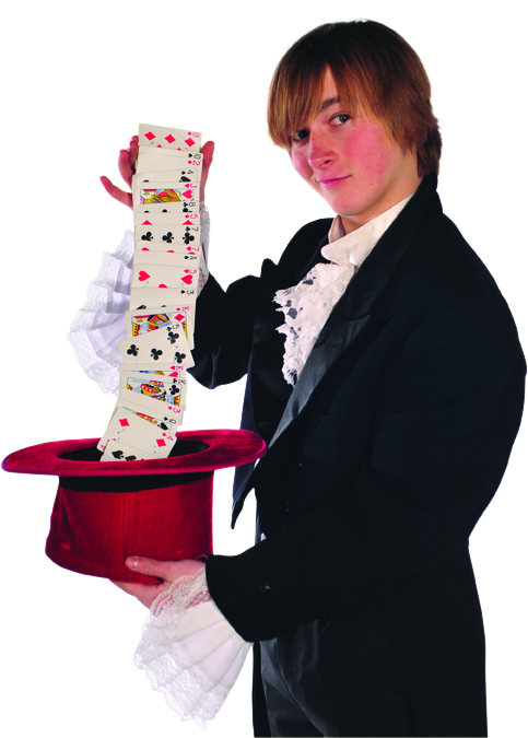 KingMagic